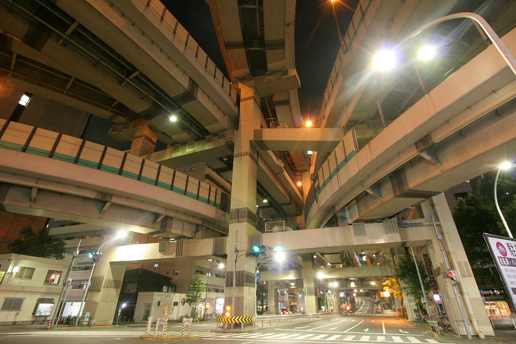 Aug. 18, 2009